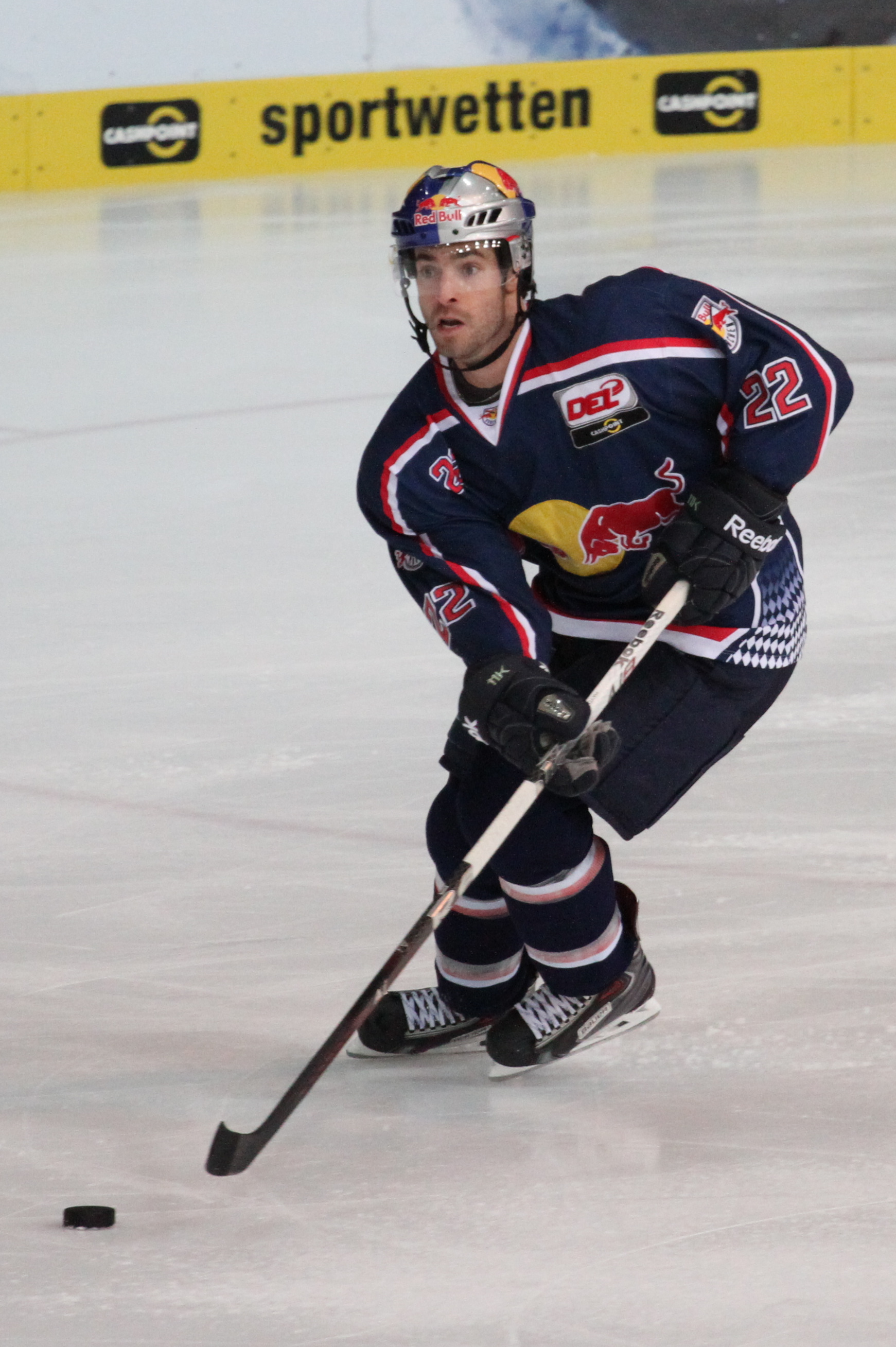 Darren Haydar am Puck.